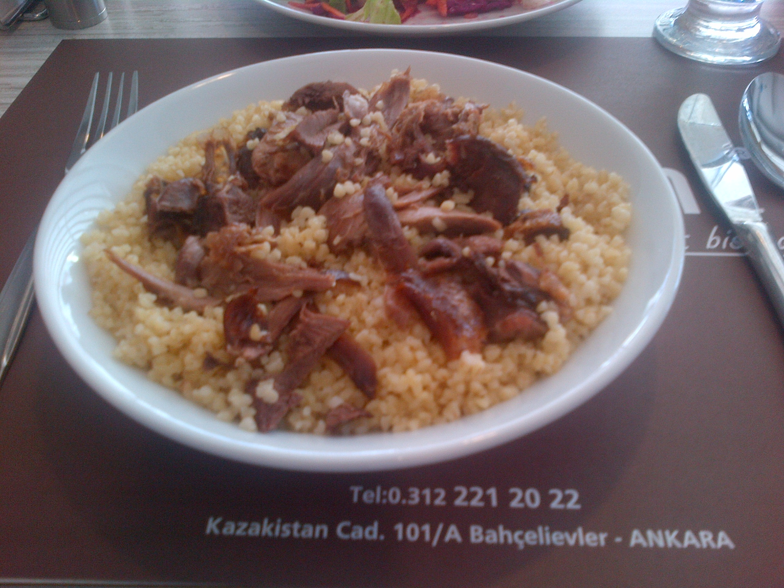 Carne de ganso de un "kaz tiridi" sobre "bulgur pilavı".